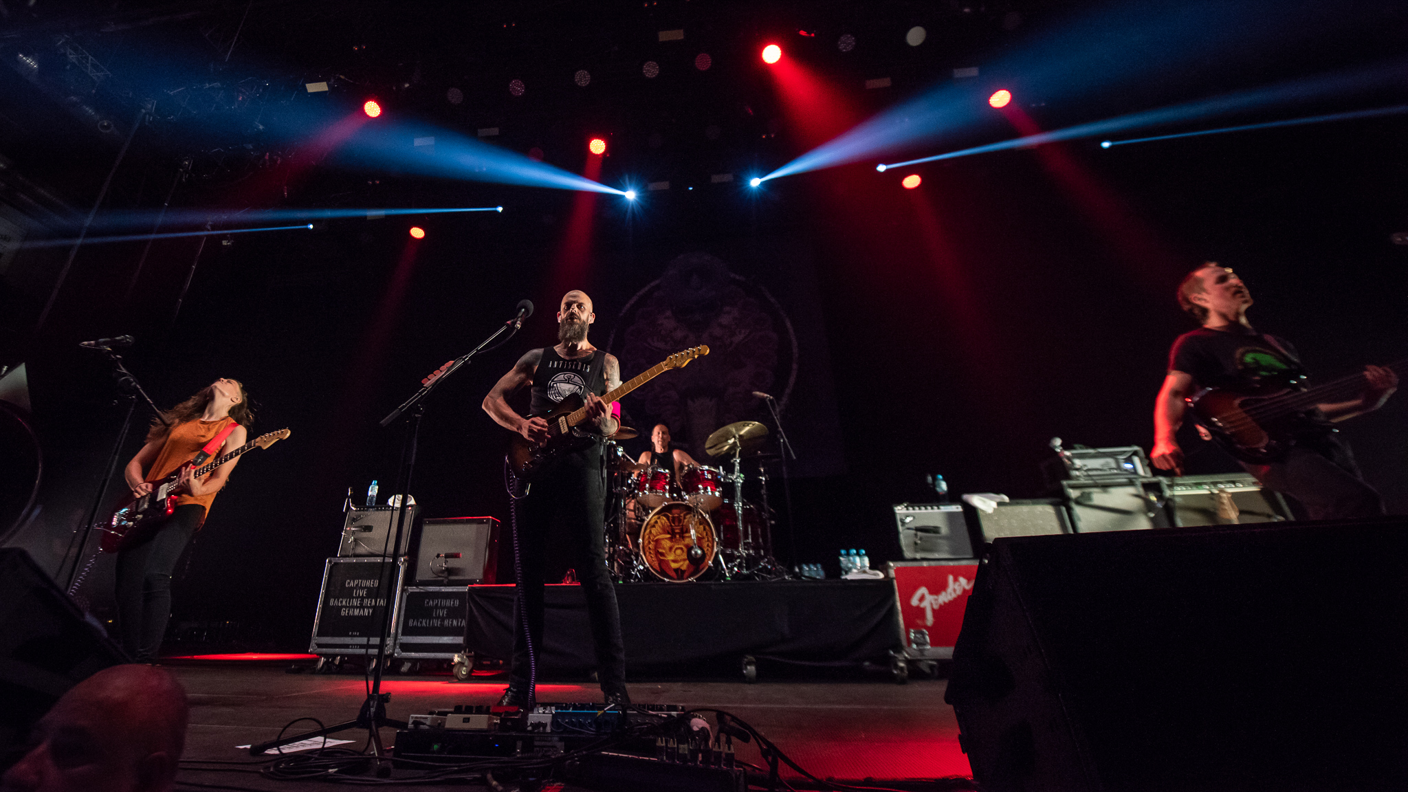 ARGO-Konzerte,Alternarena,Baroness,Festival,Gina Gleason,John Baizley,Konzert,Livekonzert,Livemusik,Musik,Nick Jost,RiP,Rock im Park 2018,Sebastian Thomson